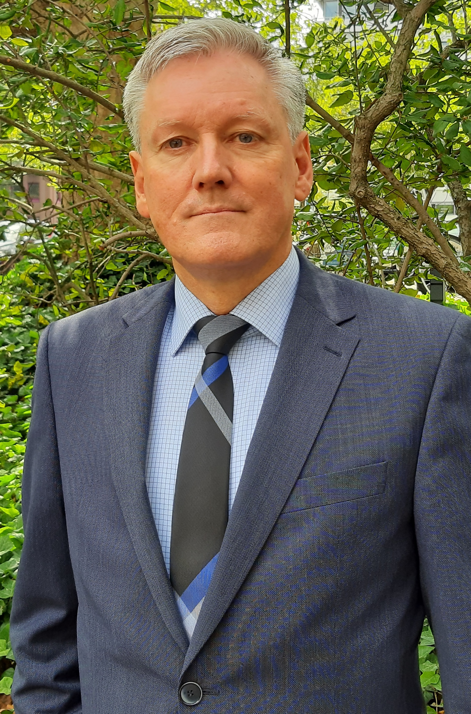 Antoin Scholten (2019)